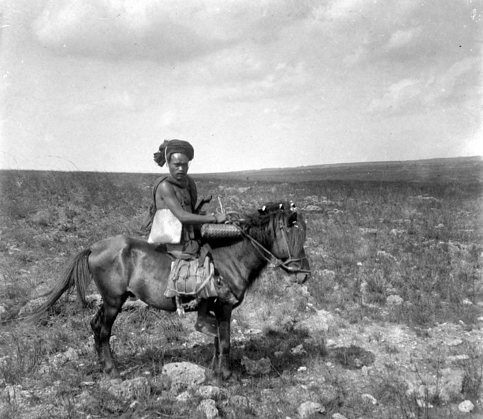 Seorang lelaki Sumba di atas kuda, dengan seekor babi yang digantungkan pada anyaman daun pisang